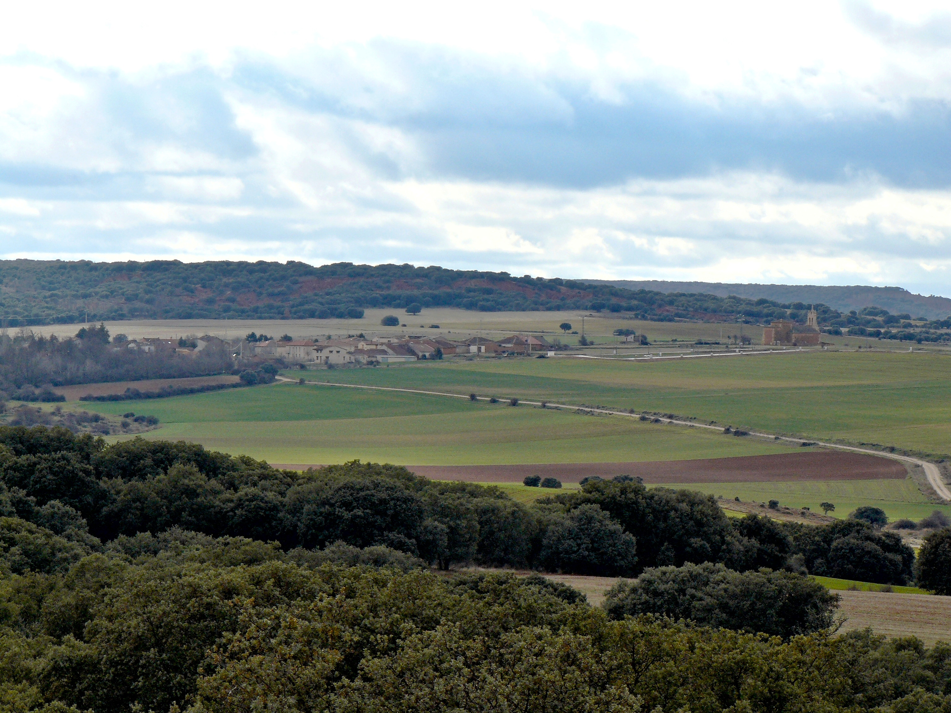 Pajares de Fresno, Segovia.